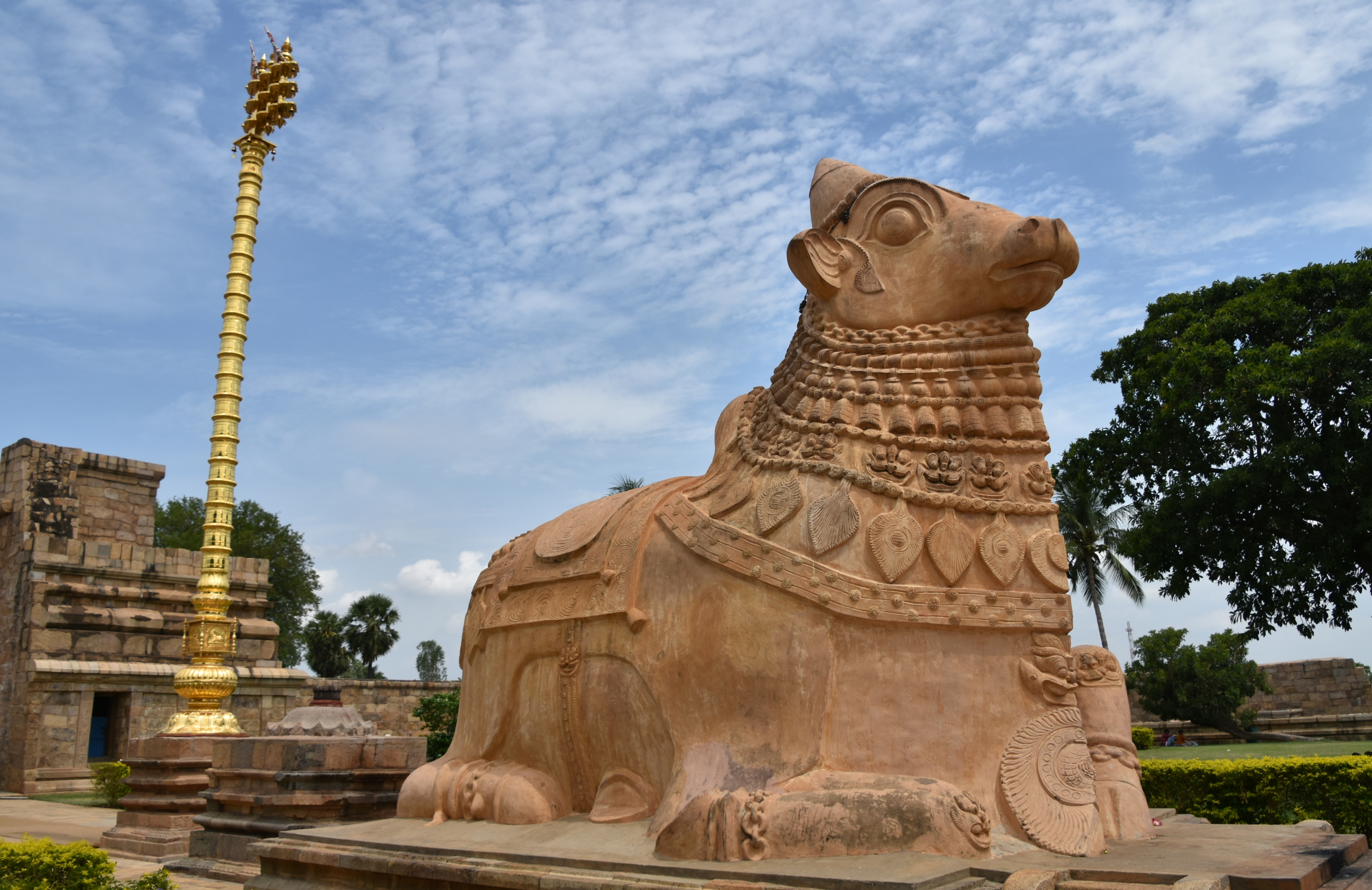 Hindu temple Chola Hinduism